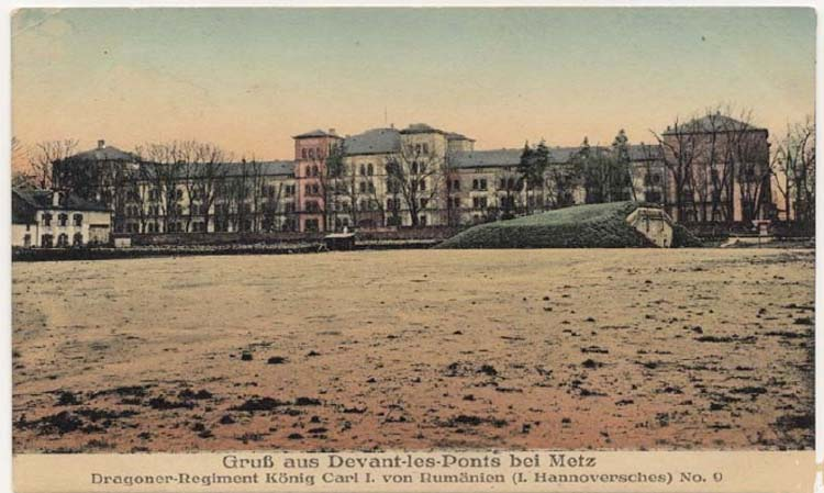 La Ronde-Kaserne in Metz (Caserne Desvalliere)